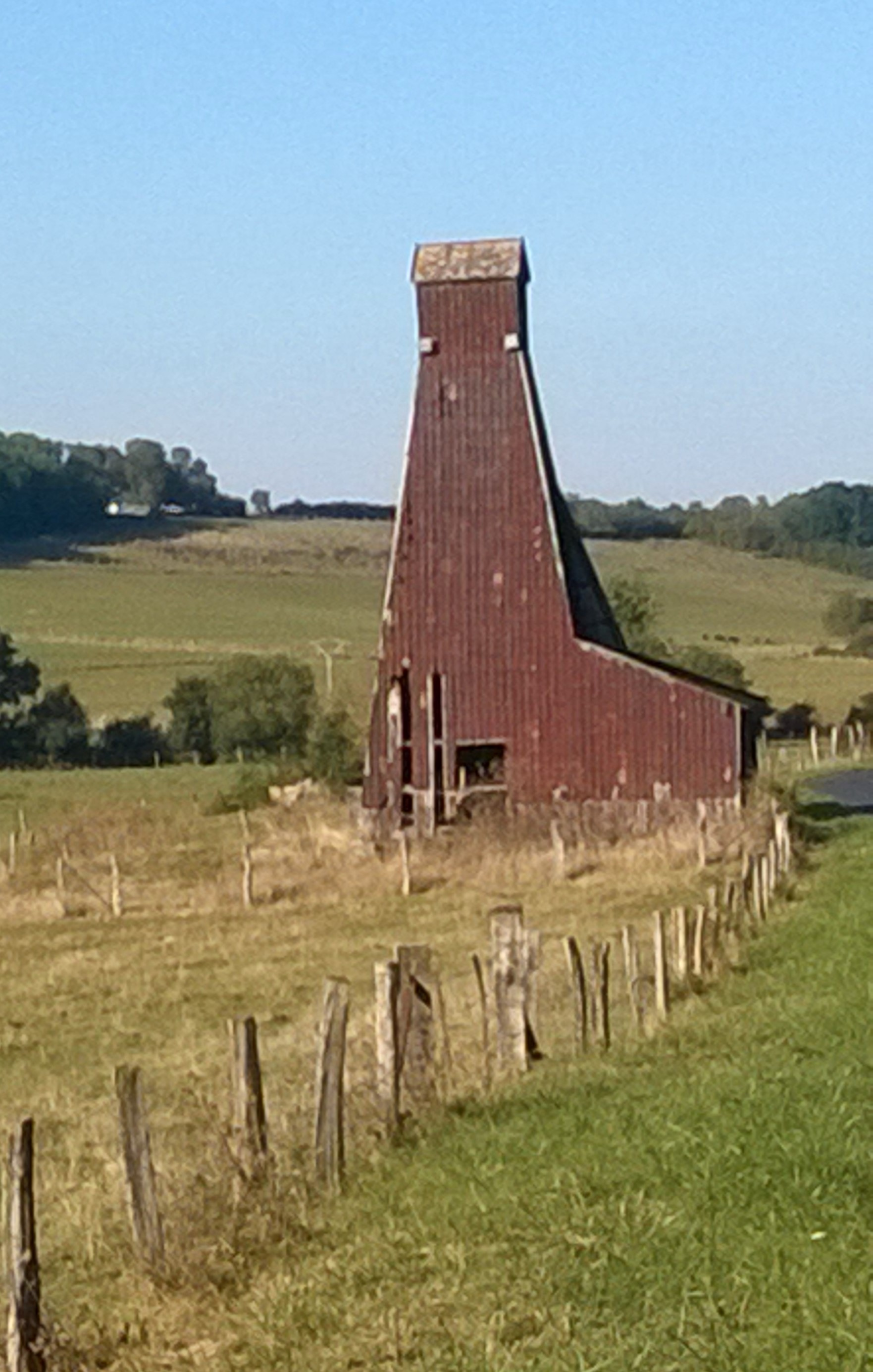 Sondages salins de la vallée de la Roanne (aussi situés à Lenoncourt) à Varangéville .